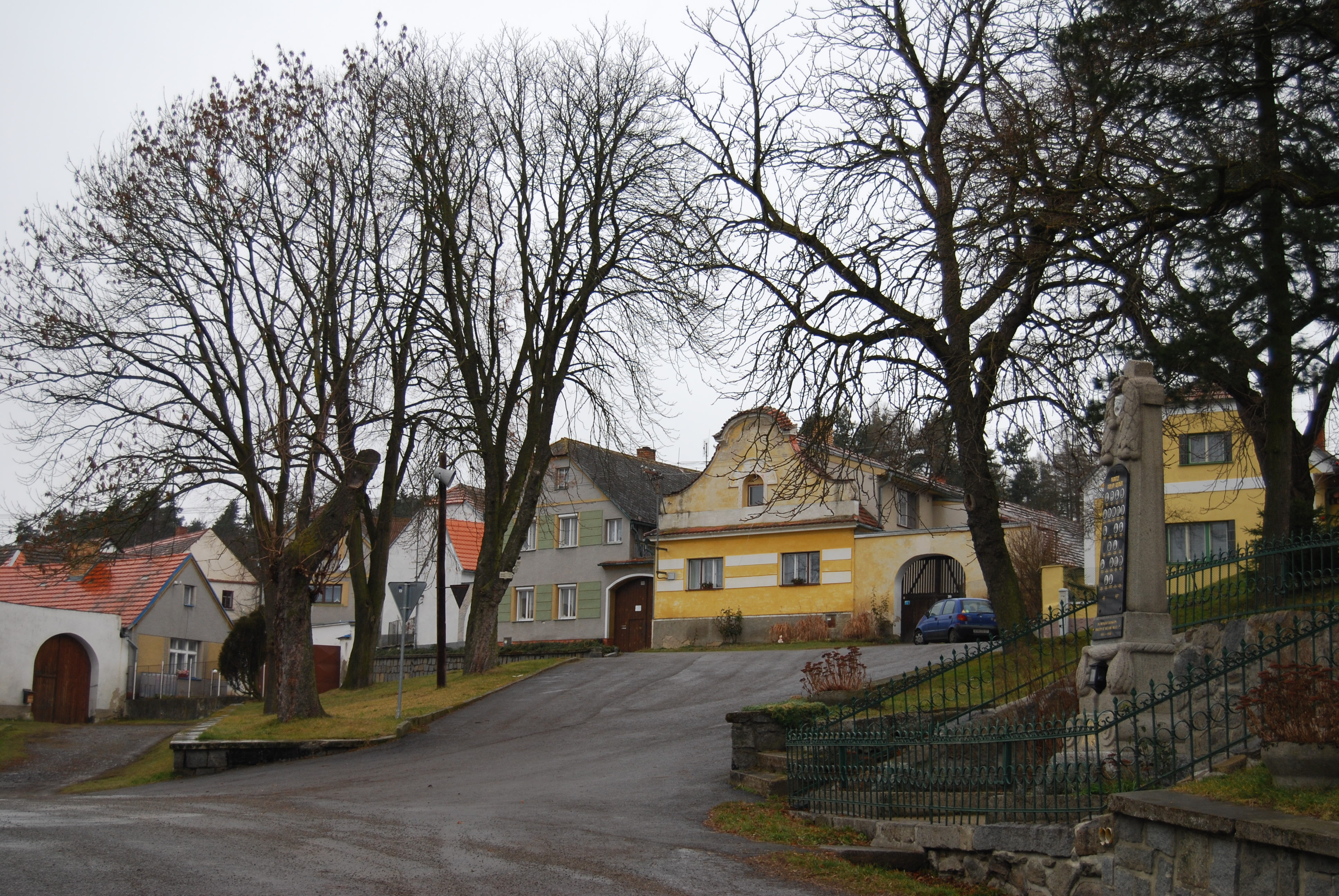 Pohled na část návsi. Chrášťovice v okrese Strakonice, kraj Jihočeský. Česká republika.